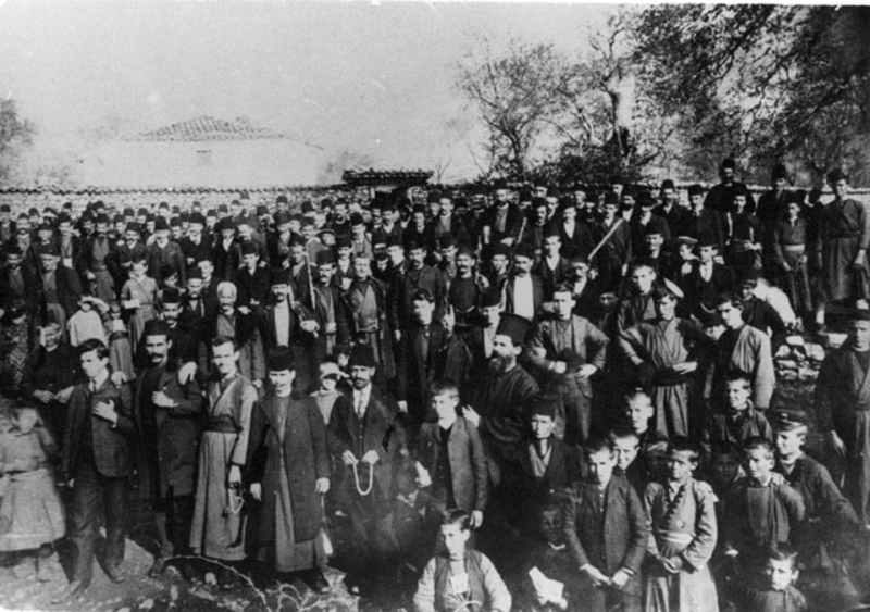 Антибългарски митинг в двора на митрополията в Костур през май 1904 година срещу идването в града на българския битолски митрополит Авксентий.